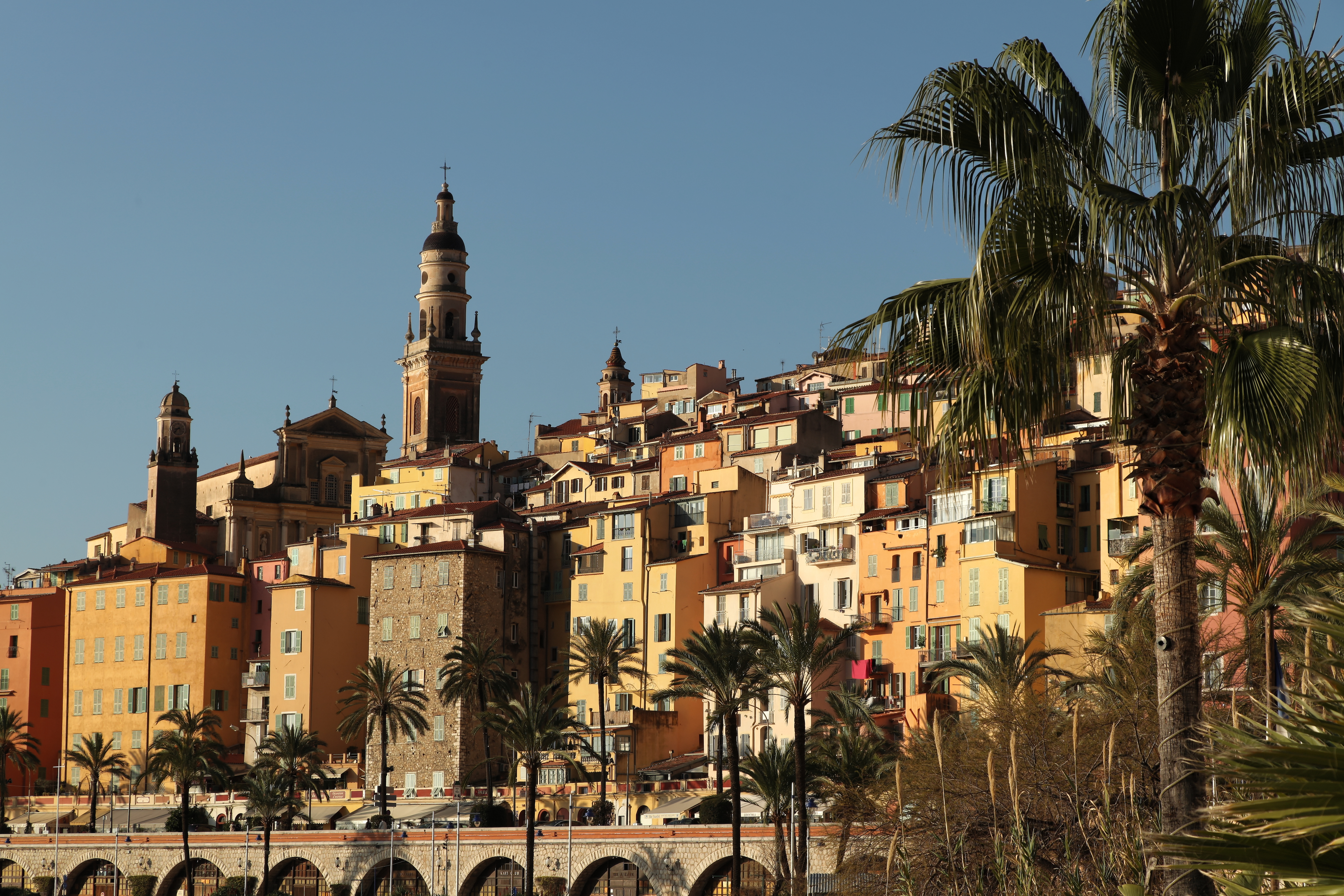 Vue de le vieille ville avec la basilique Saint-Michel .